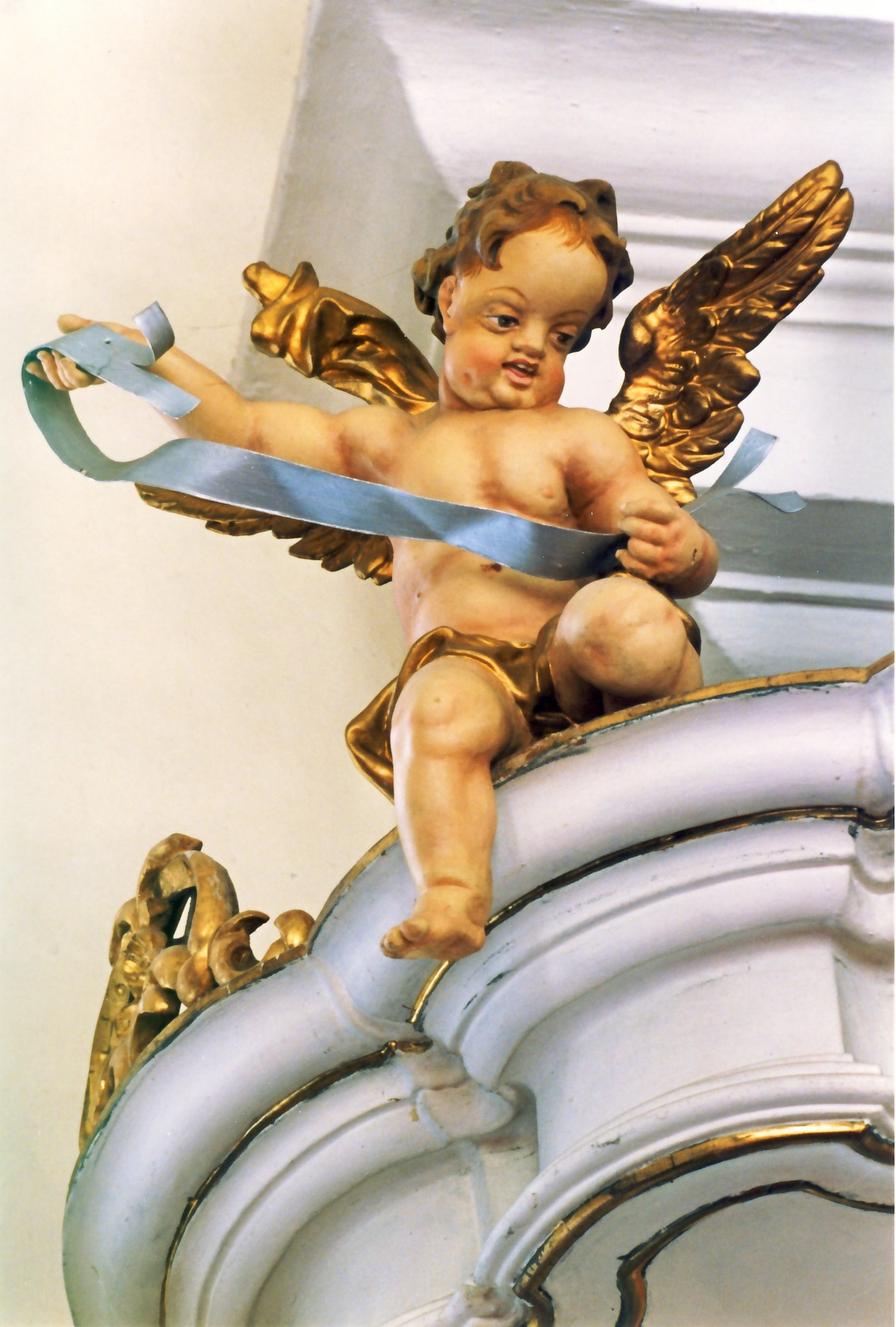 Kanzelputto von Mang Anton Stapf in der Kirche von Berwang (Tirol)